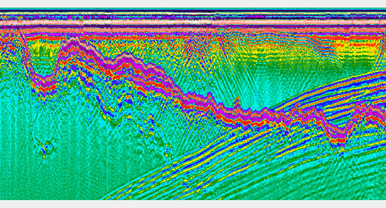 Радарограмма дна р. Амур, выполненная георадаром Лоза